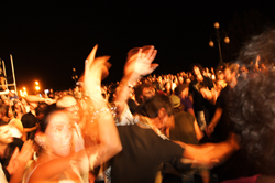 pubblico Festival dello Stretto 2008 Cd club entertainment Ac World Kajzar Paula